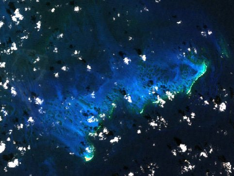 Foto der ISS